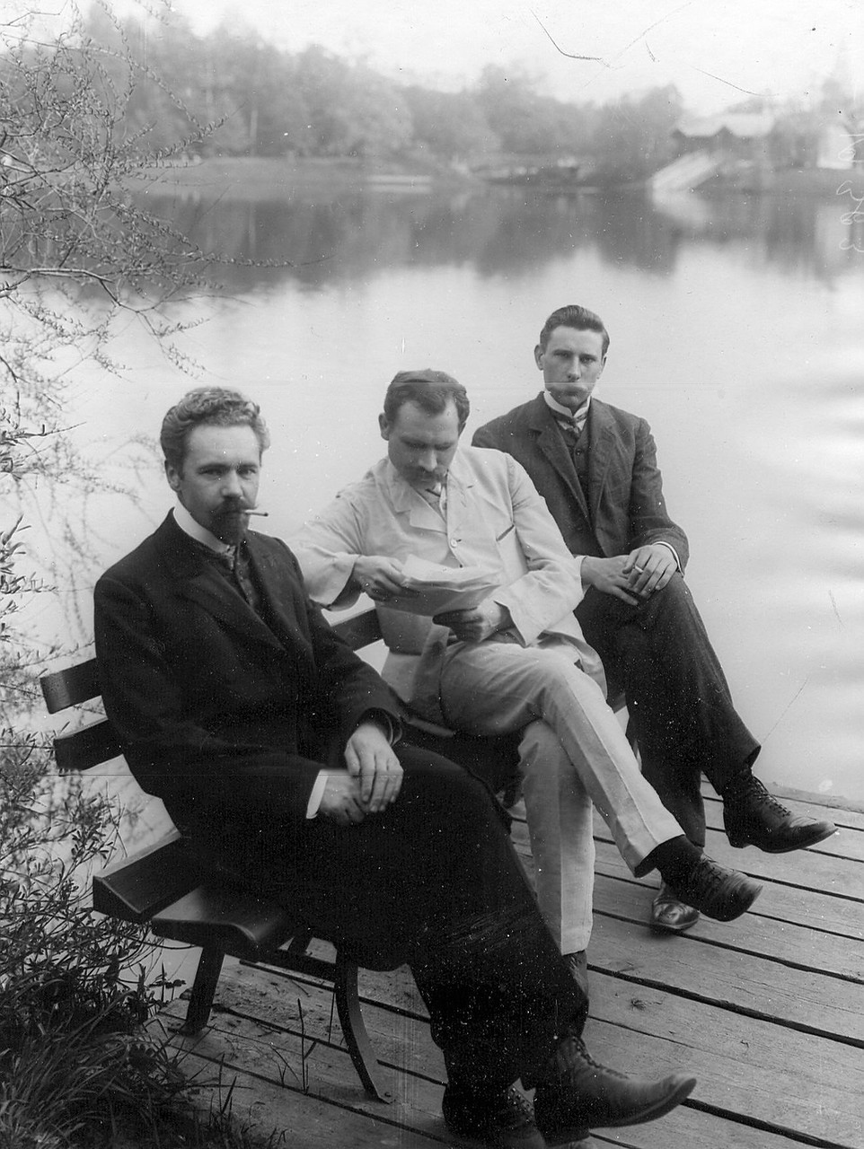 Литовские депутаты 2-ой Государственной Думы в Таврическом саду. Слева направо: Владислав Андреевич Сташинский (Vladas Stašinskas), Андрей Андреевич Булат (Andrius Bulota), Антон Сигизмундович Купстас (Antanas Kupstas)